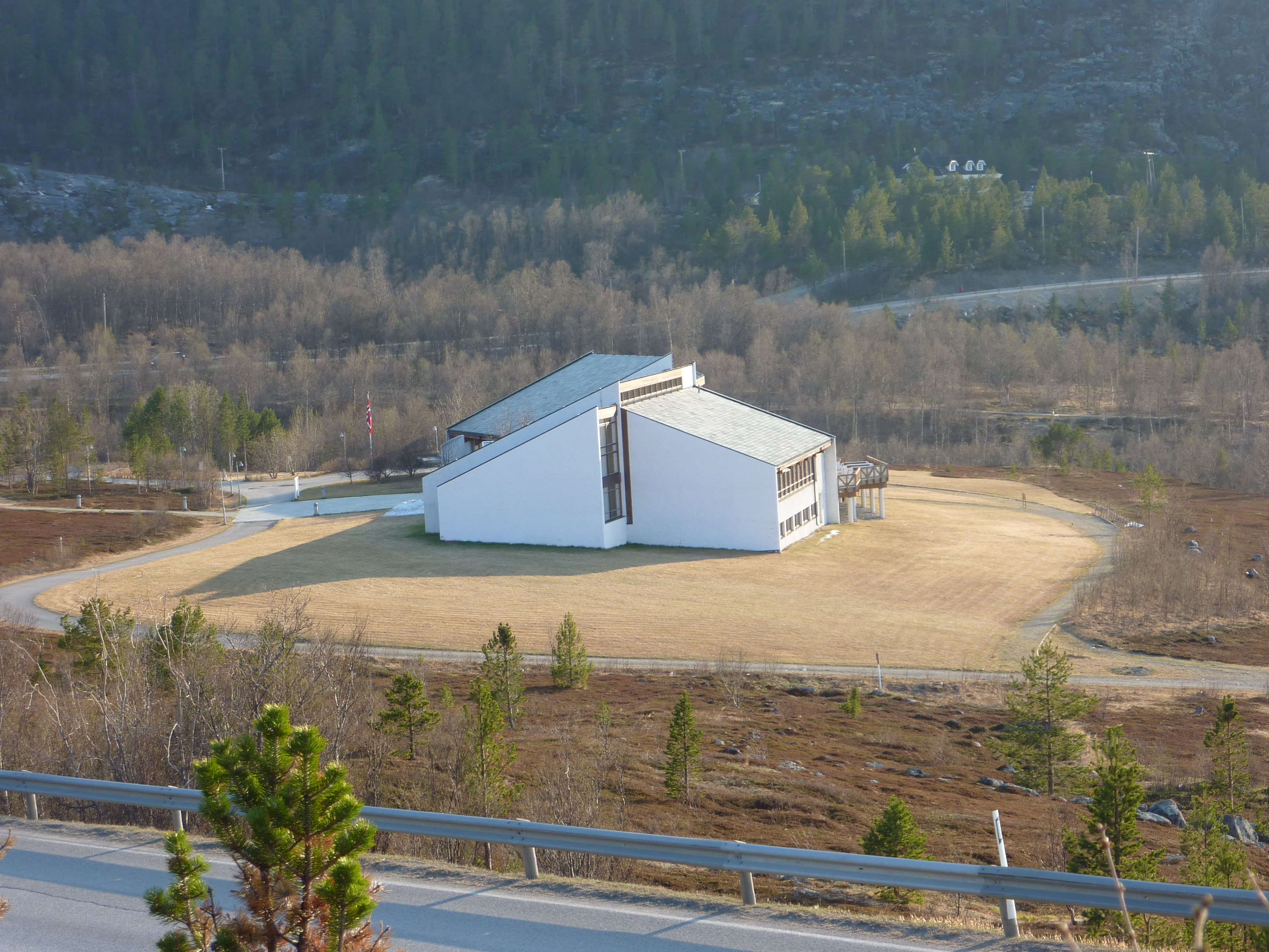 Alta Museum